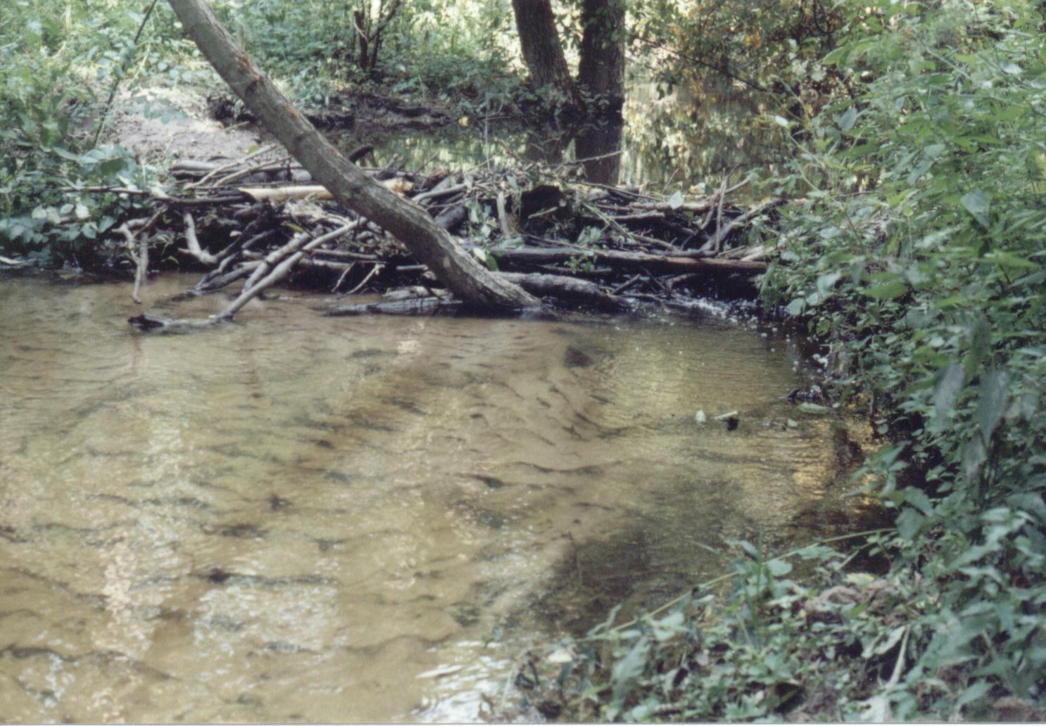 Strumień w Rezerwacie Przyrody Babsk